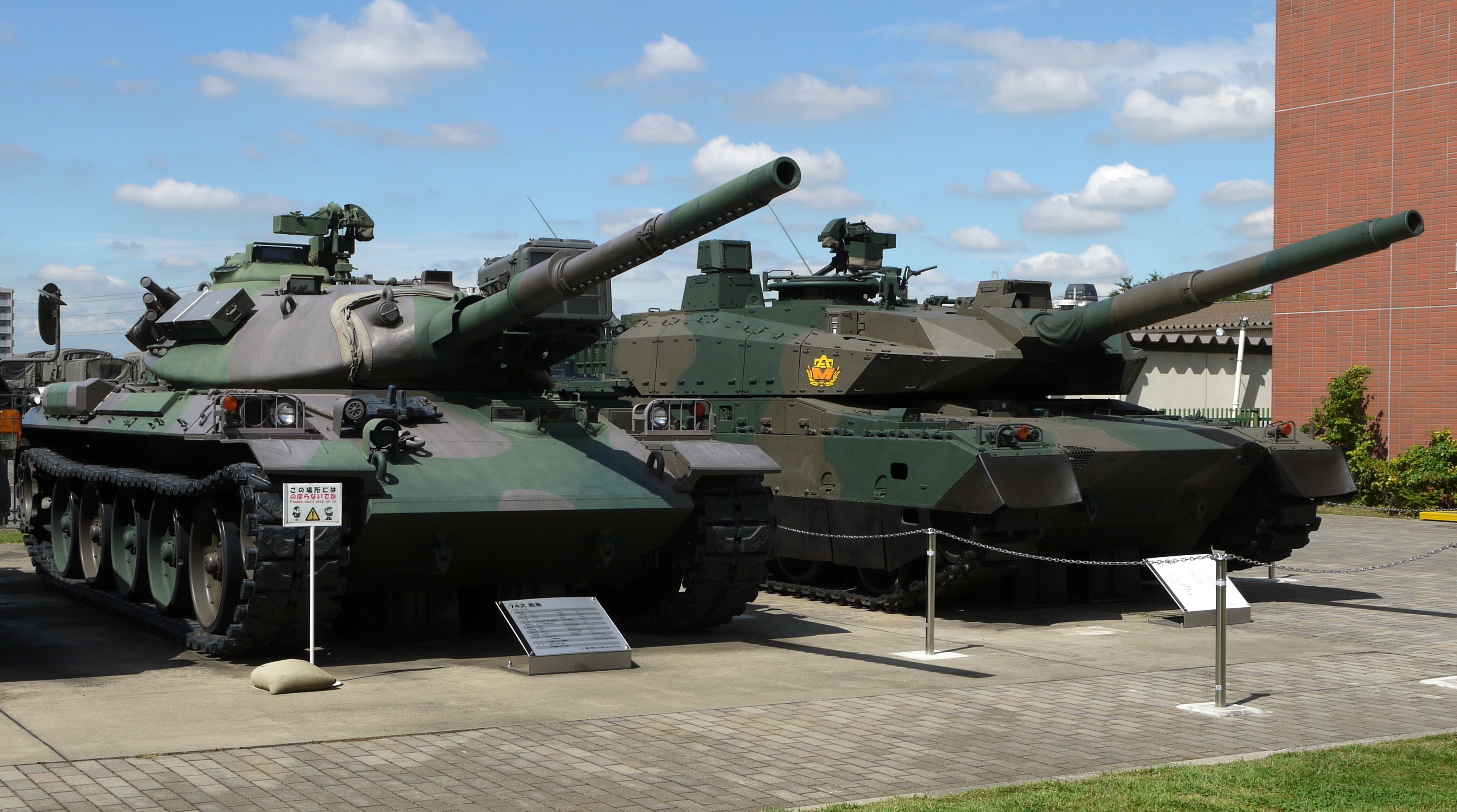 陸上自衛隊広報センター屋外に展示されている74式戦車と10式戦車の試作1号車。